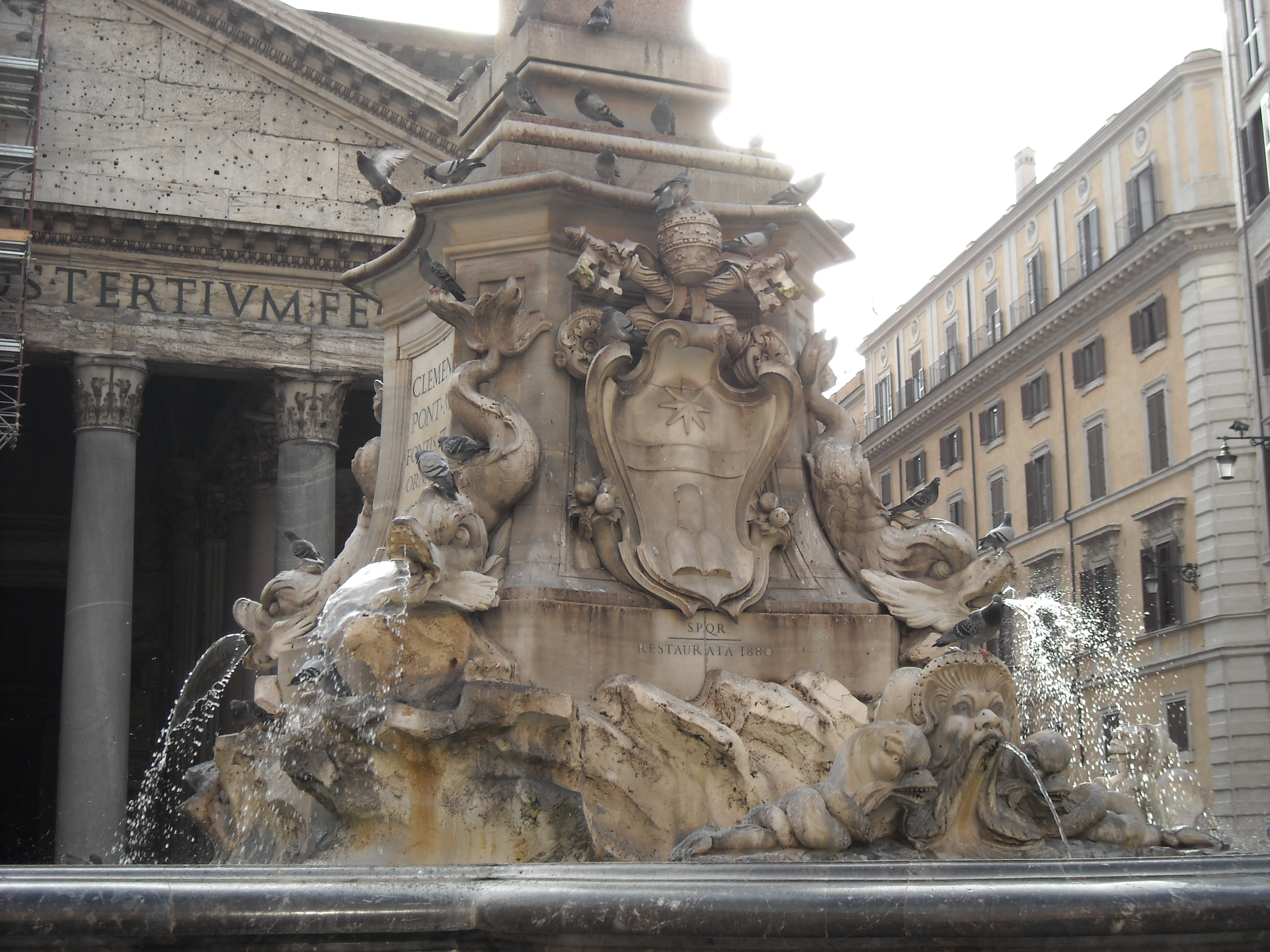 Fontana di piazza della Rotonda - particolare della base dell'obelisco